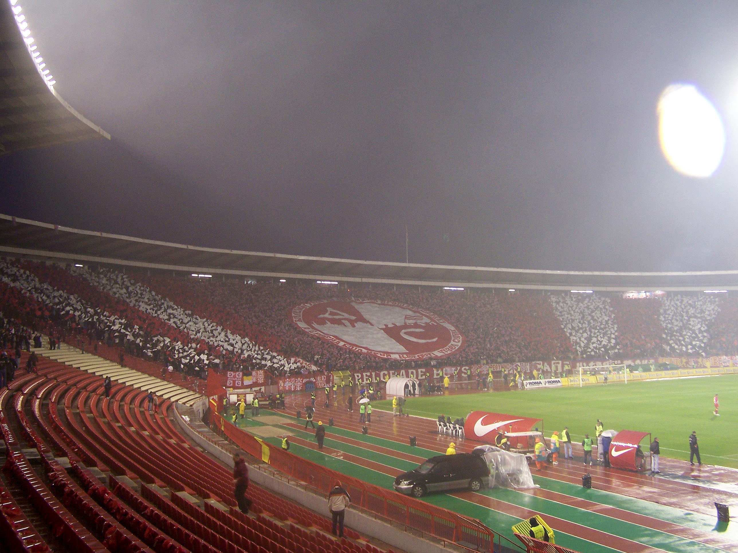 Delije during the FK Crvena Zvezda - FK Partizan match in Belgrade